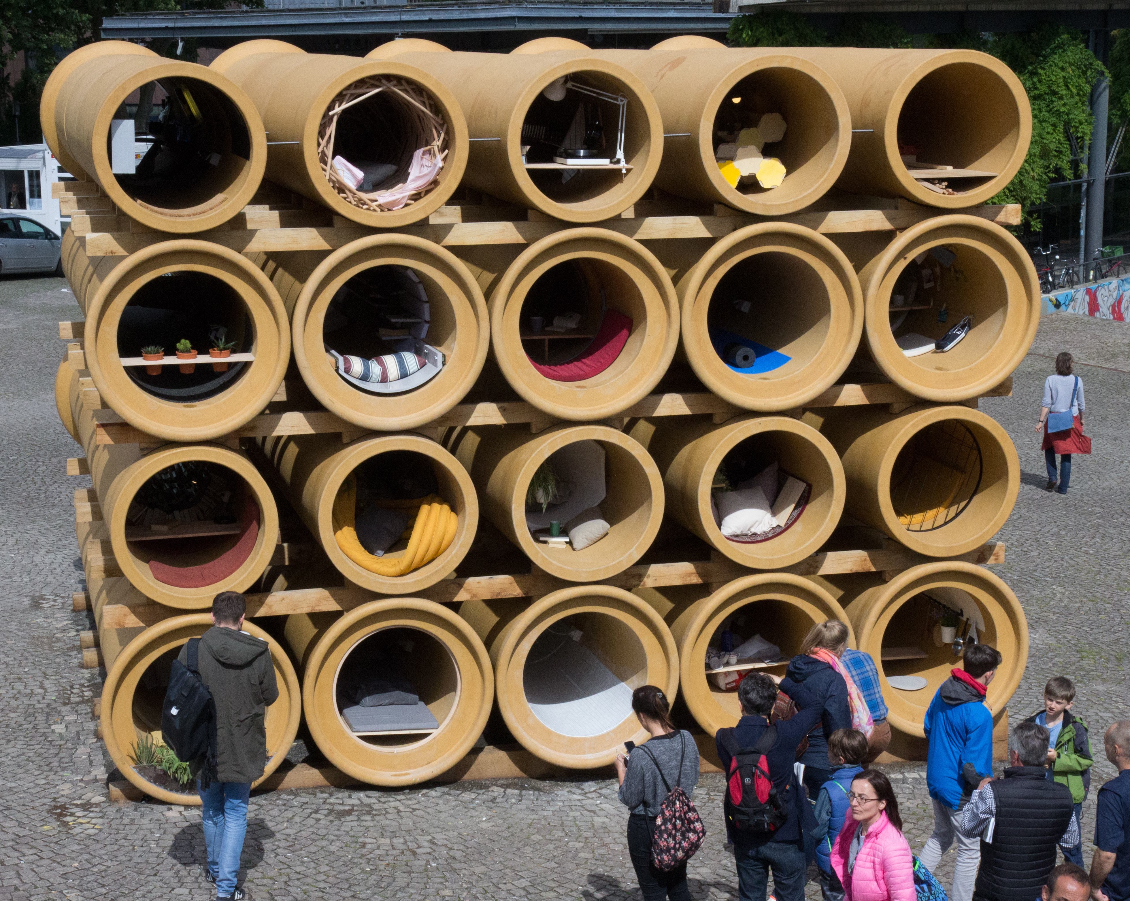 Documenta 14 in Kassel: Hiwa K